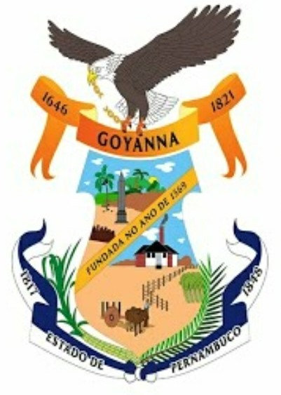 Brasão de Armas de Goiana